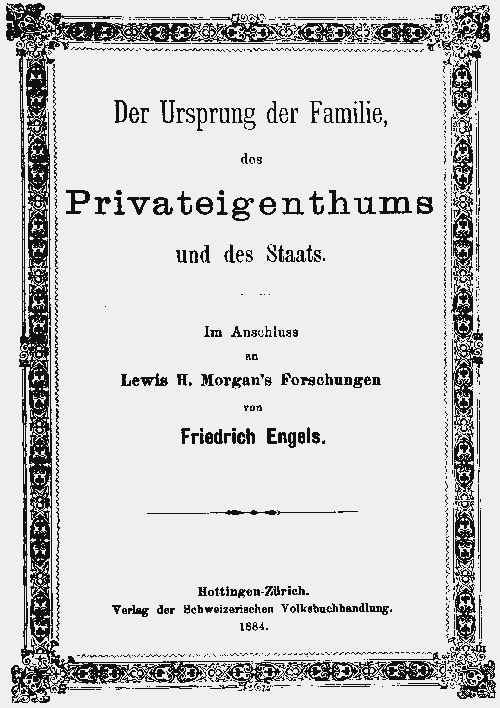 Friedrich Engels: Der Ursprung der Familie, des Privateigentums und des Staats, 1884 ; Cover